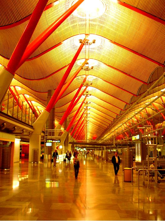 Terminal T4 do Aeroporto Internacional de Barajas, em Madrid.